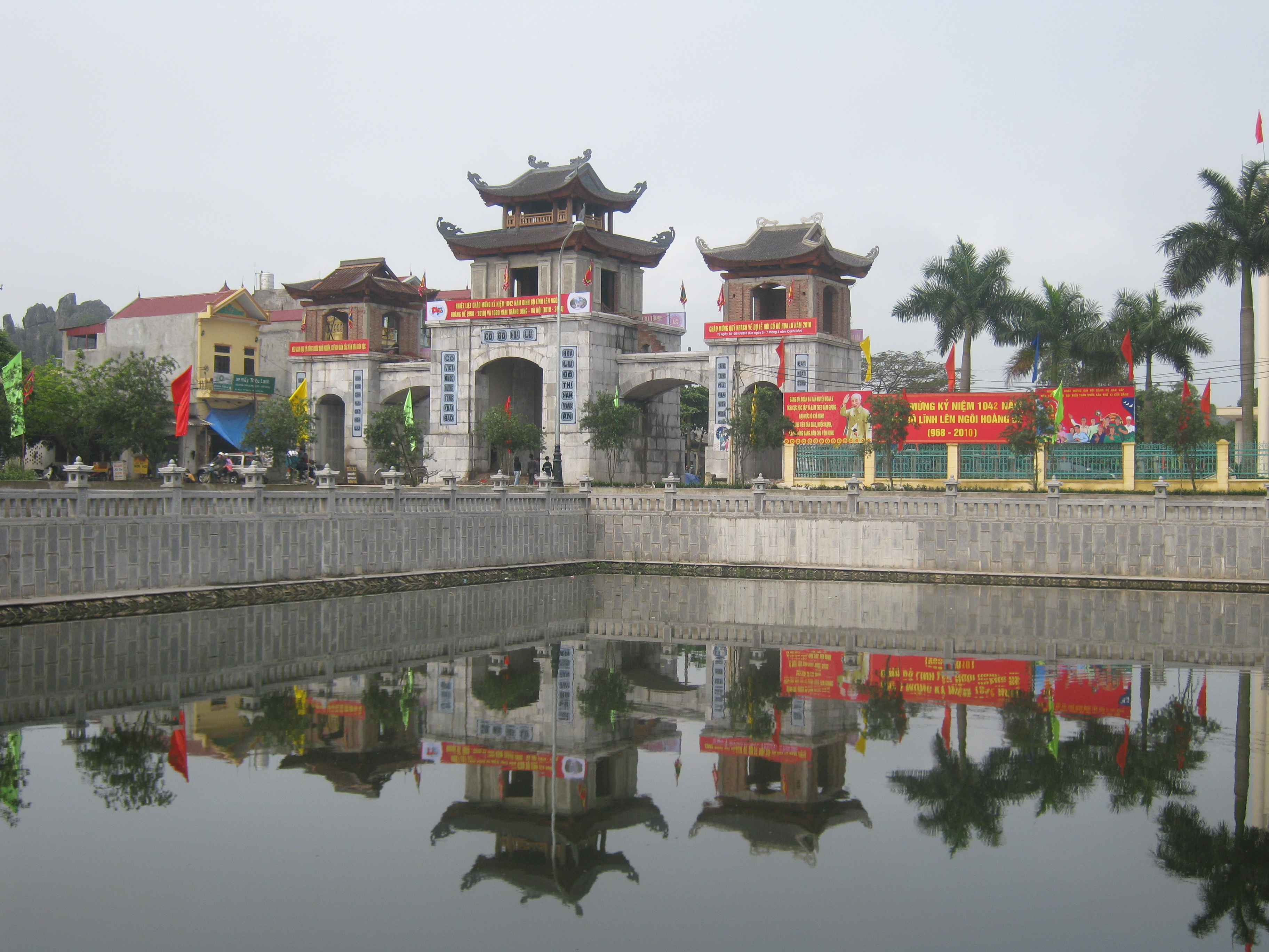 Cửa Đông vào cố đô Hoa Lư.